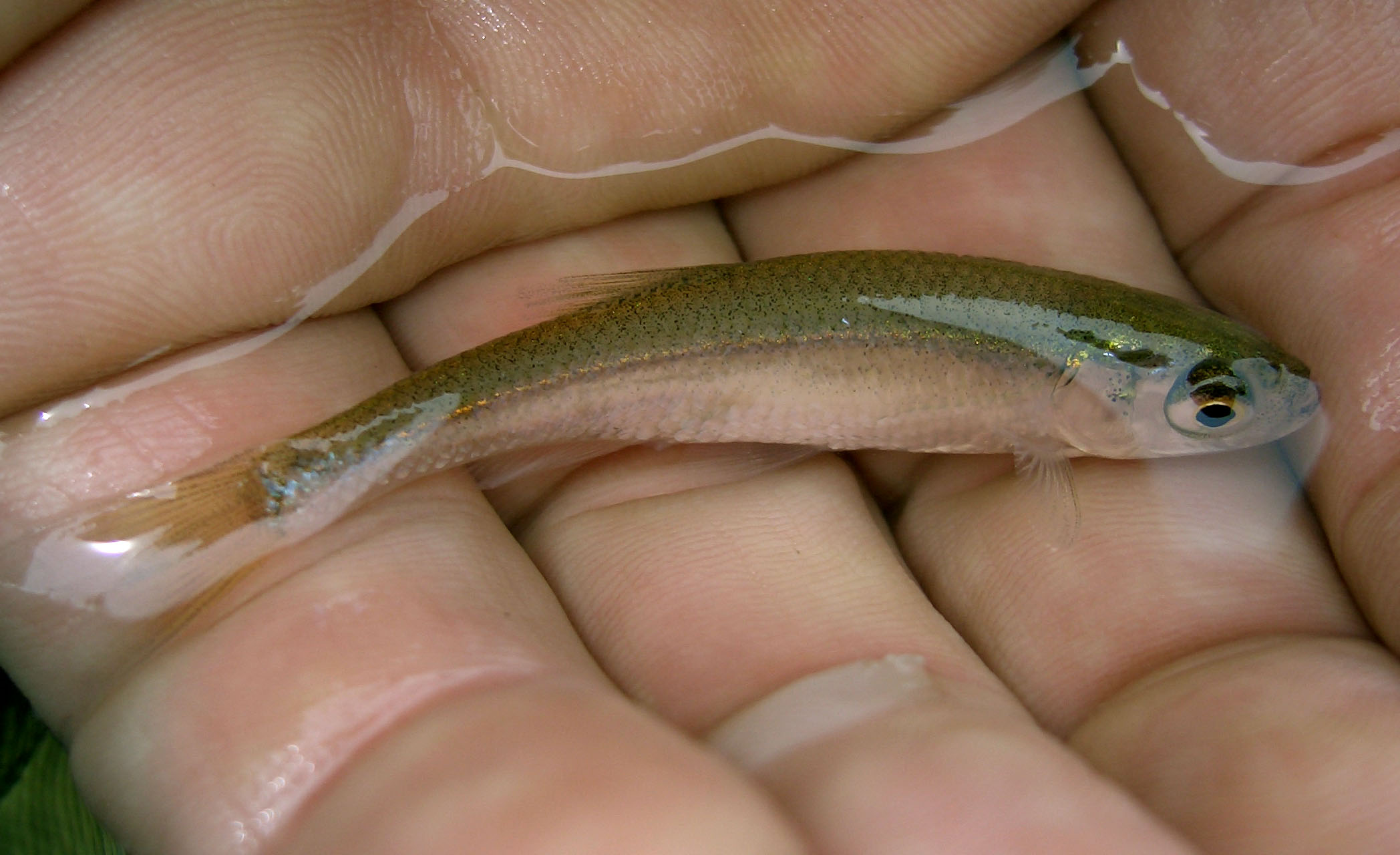 Moderlieschen